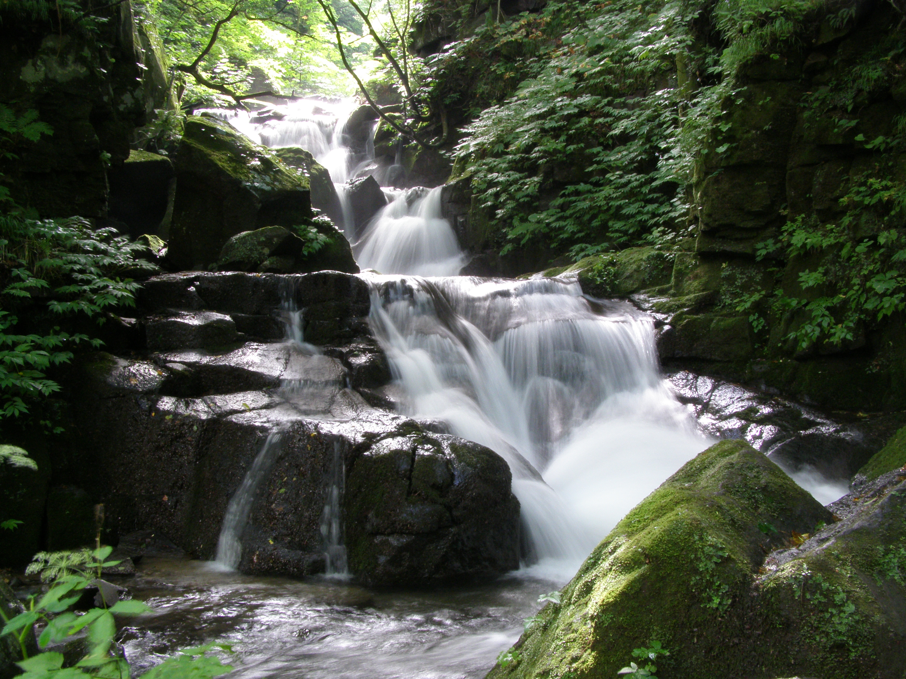 奥入瀬渓流にて撮影